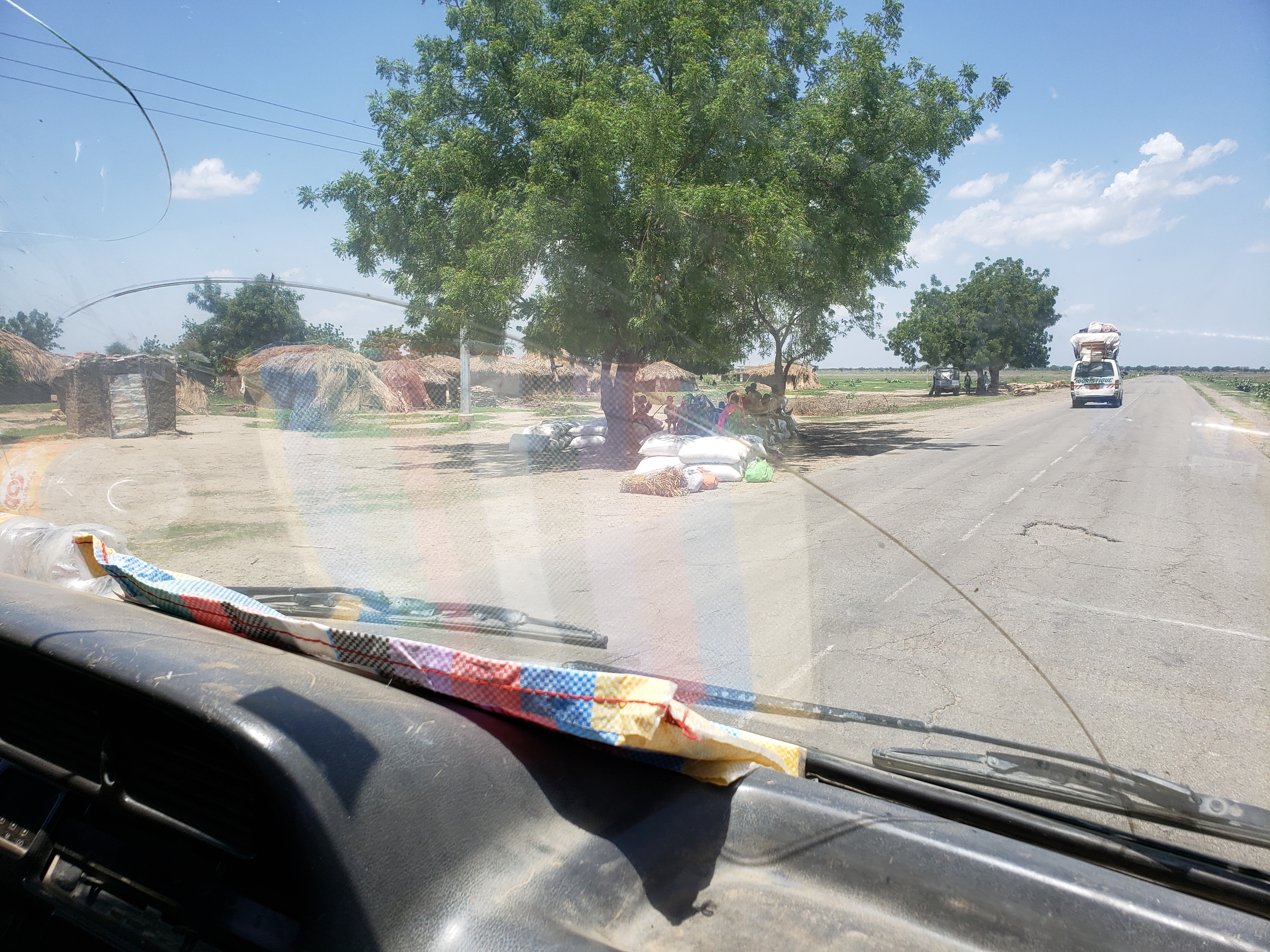 Transport en campagne Cameroun